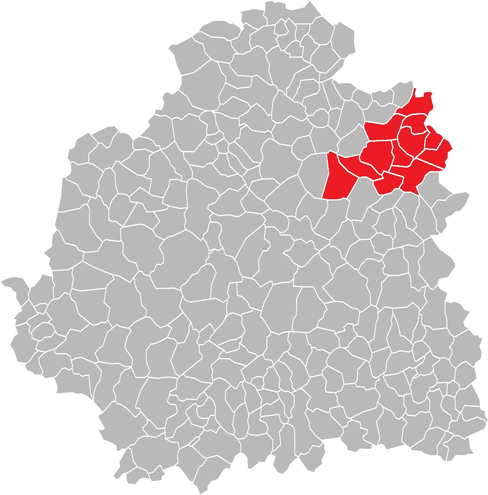 Carte des communes de l'Indre (36) : Le canton d'Issoudun-Nord, de 1801 à 2015.